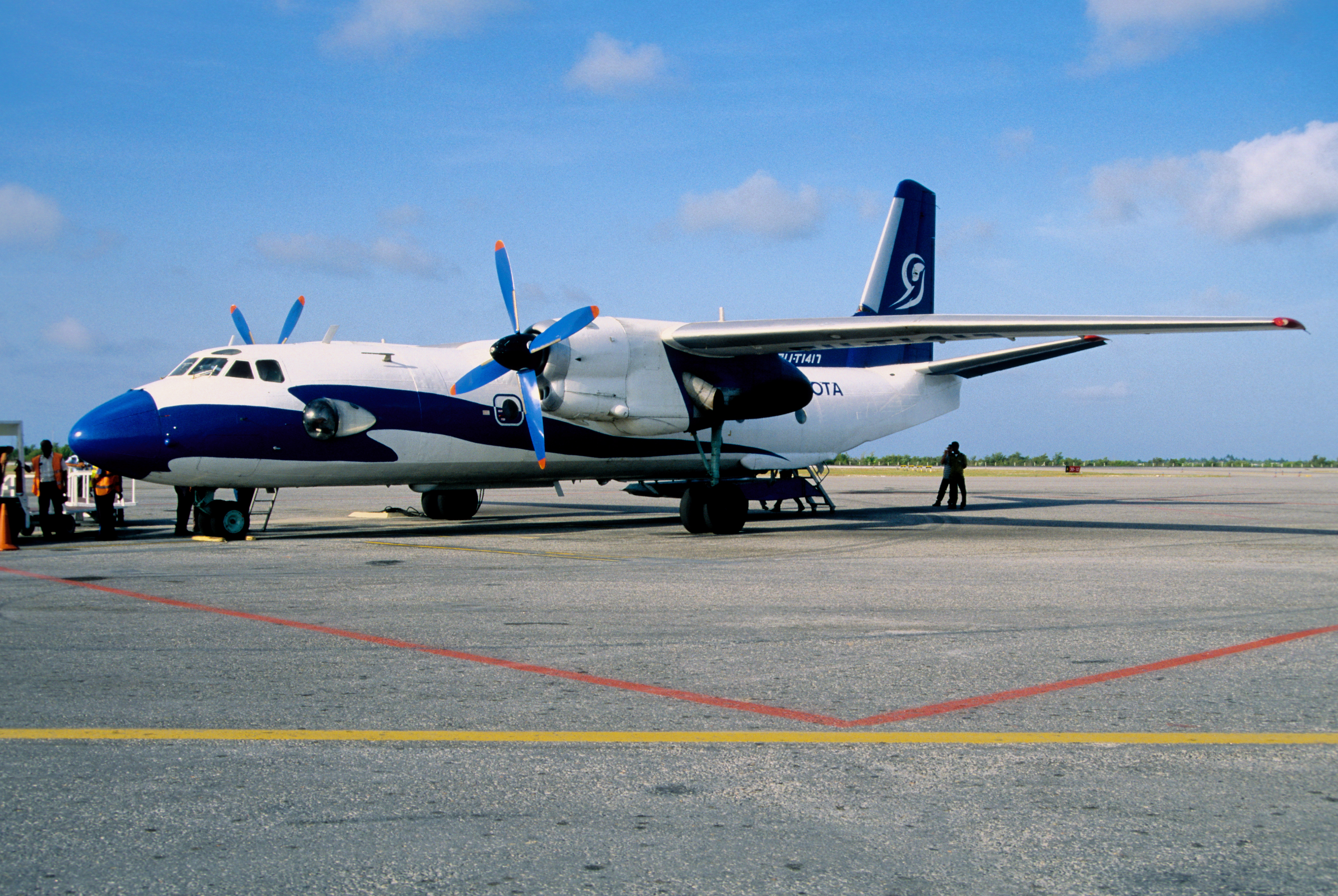 300ae - Aerogaviota Antonov 26; CU-T1417@CYO;23.6.2004